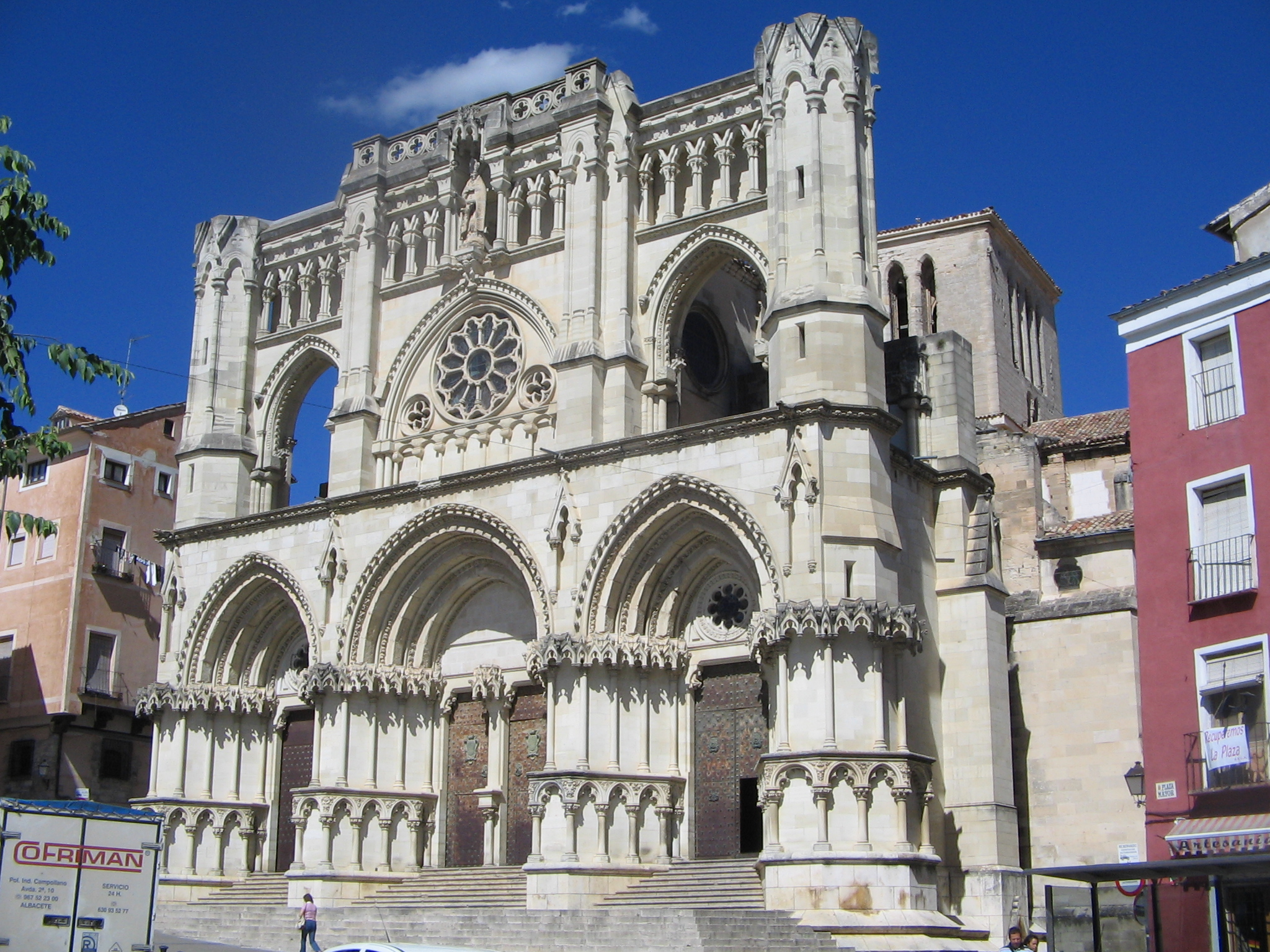 Catedral de Cuenca